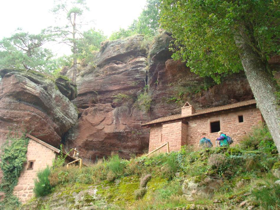 Maisons troglodytiques du Falkenfelsen, comté de Dabo